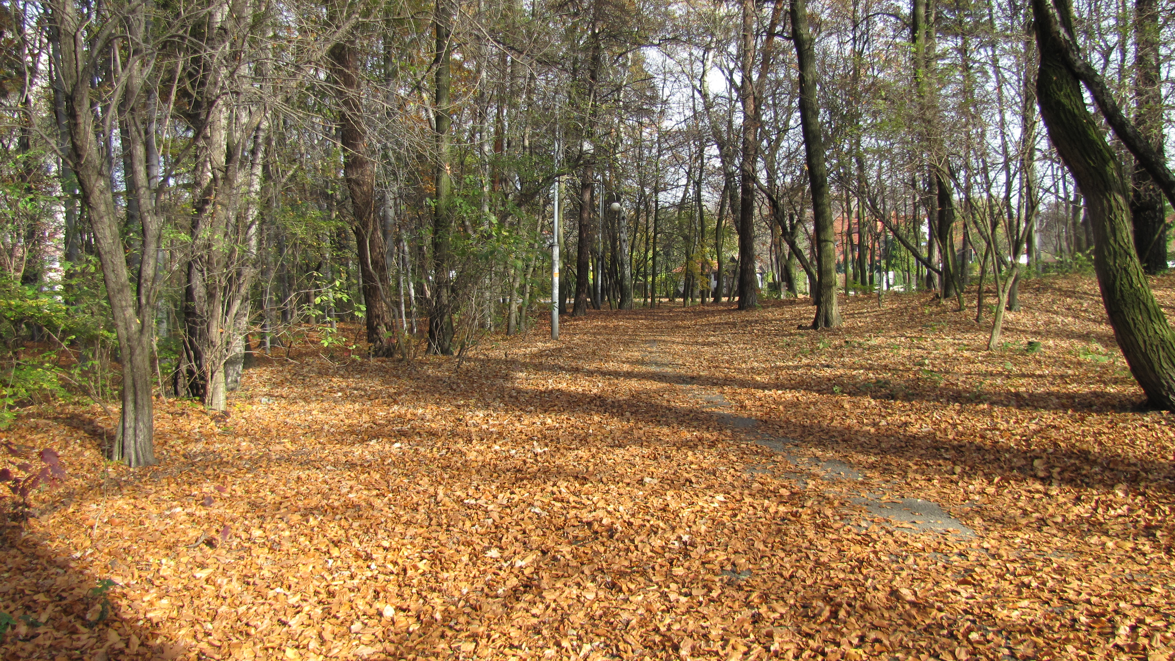 PARK PRZY KOŚCIELE ST. KOSTKI.